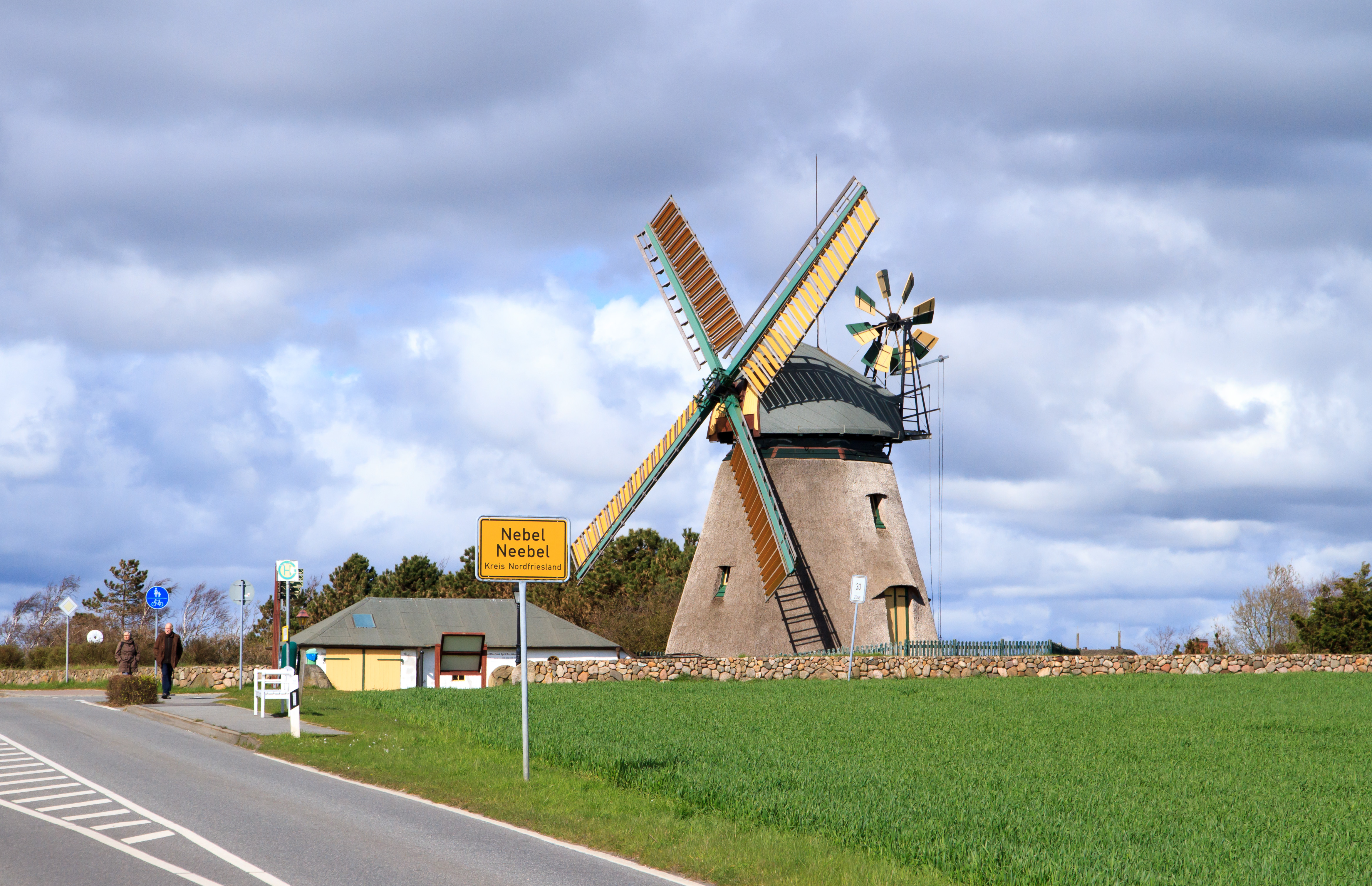 Der Ortseingang von Nebel